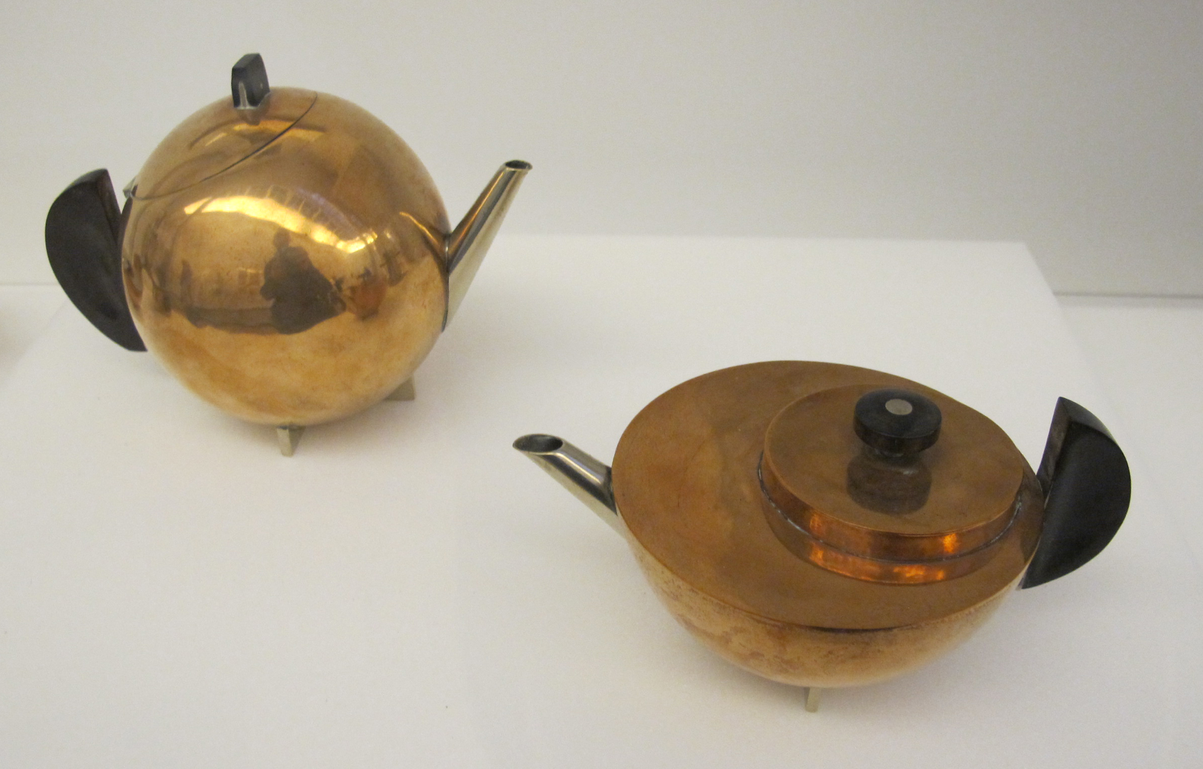 Marianne brandt, teiere, 1924